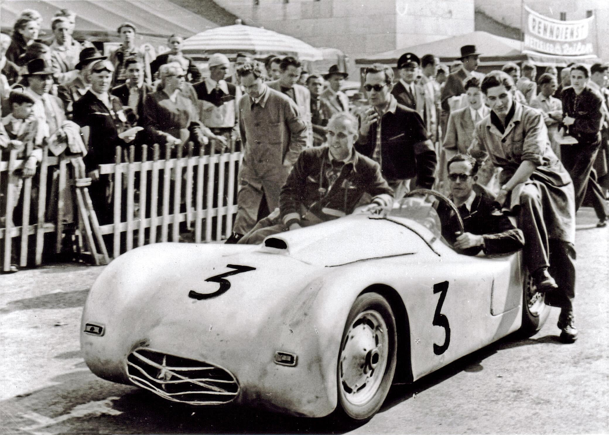 Karl-Günther Bechem in seinem AFM F-50 Rennwagen nach seinem Sieg am Norisring umgeben von seinen Mechanikern.